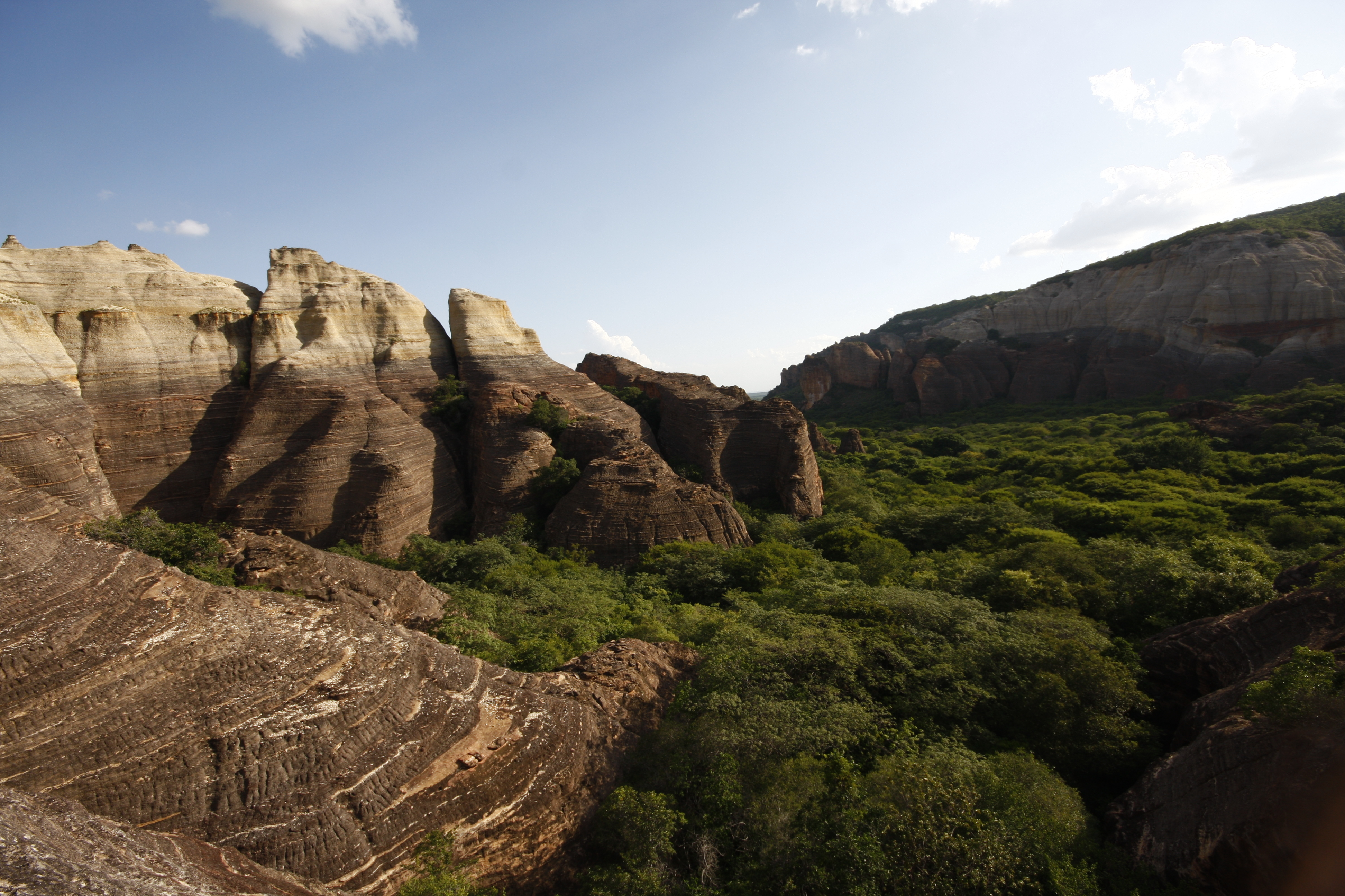 Vista parcial das formações rochosas no Parque Nacional da Serra da Capivara